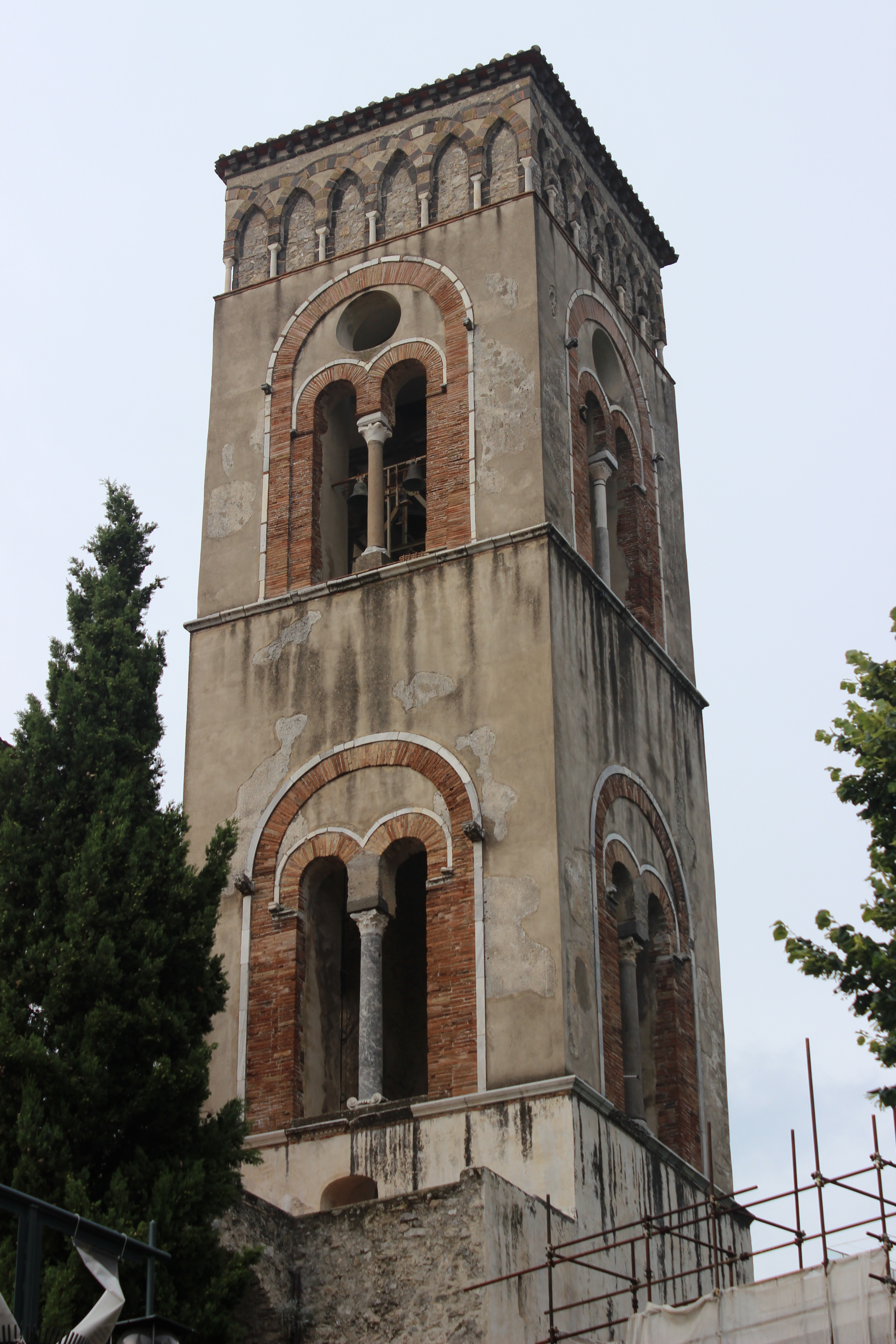 Catedral de Ravello.